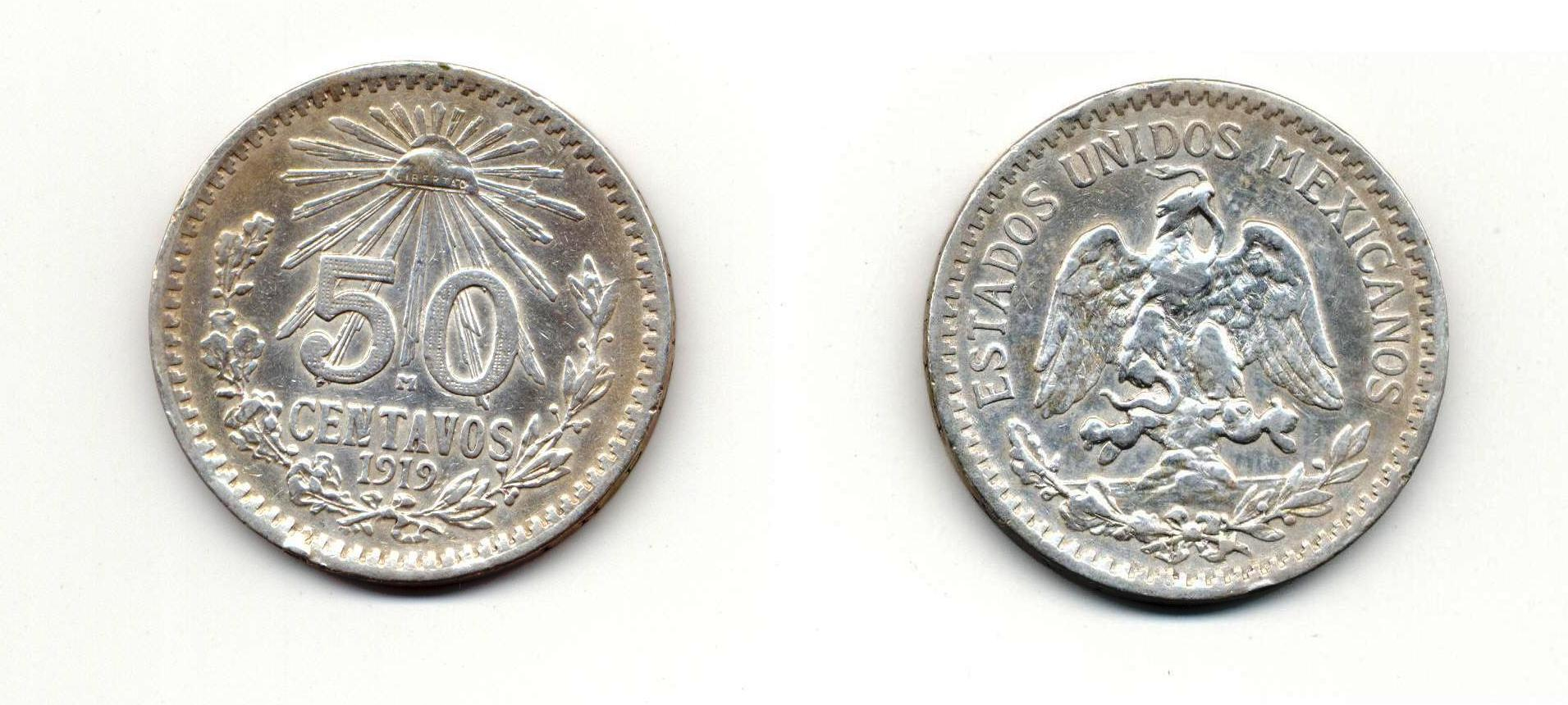 Moneda de 50 centavos acuñada en la ceca de México en 1919.